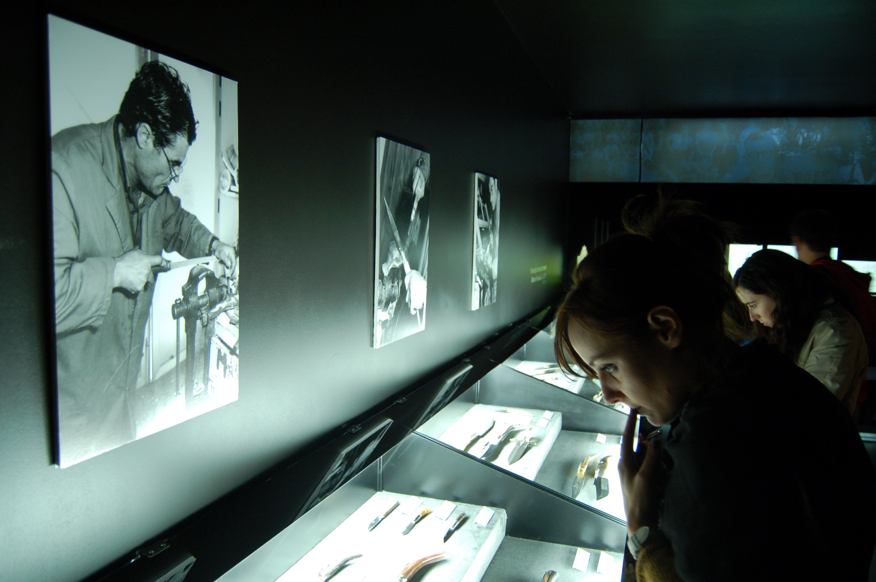 Navajas. Museo de la Cuchillería de Albacete. España